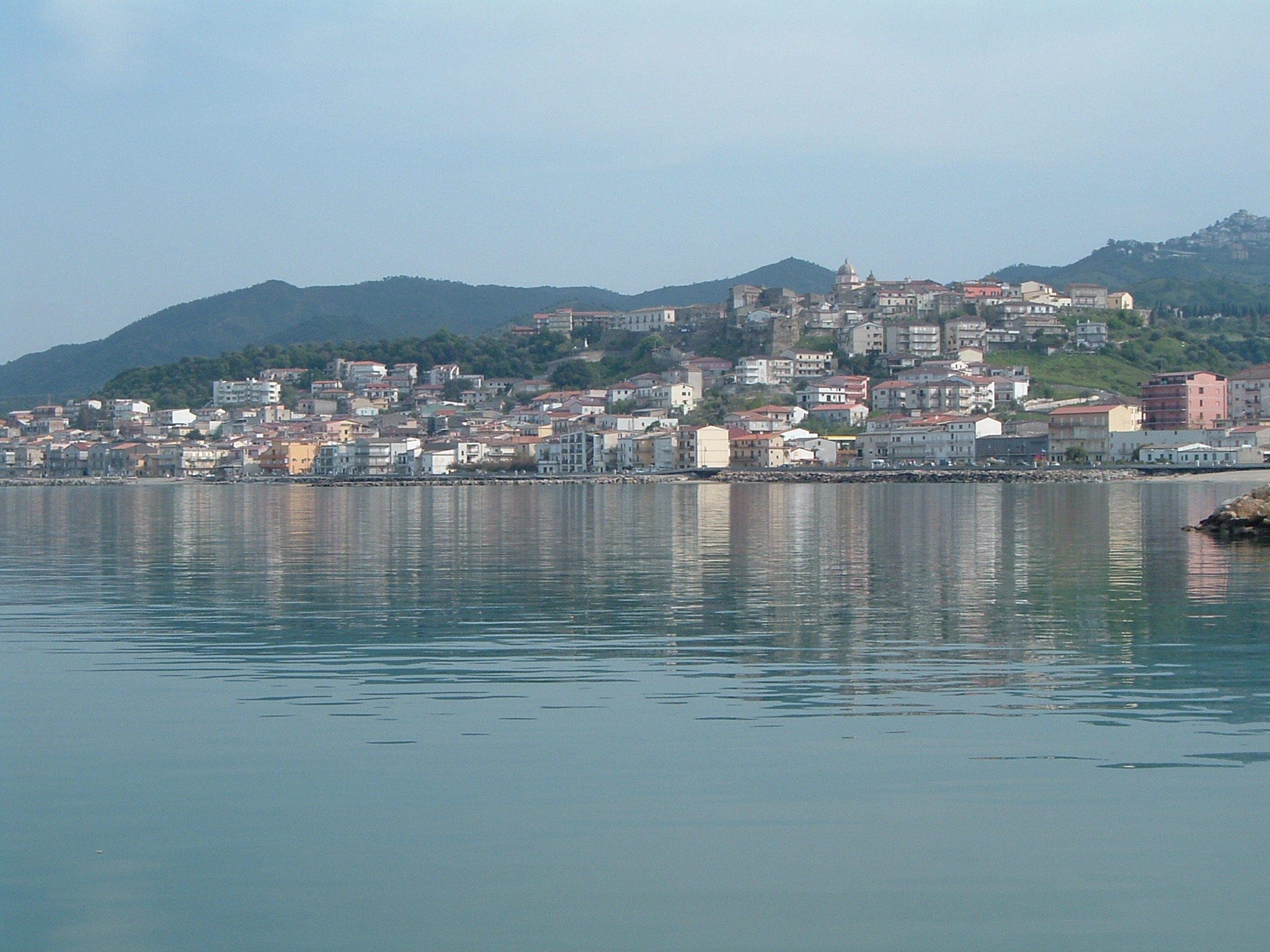 Autore:Ippolito Leonardo; Fonte: Da propria macchina fotografica digitale; licenza d'uso: Autorizzo GFDL